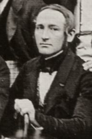 Heinrich Stuhlmann (1803–1886) Alternative namesH. StuhlmannDescriptionGerman painter and etcherDate of birth/death28 December 180323 October 1886Location of birth/deathHamburgHamburgWork period1818-1886Work locationHamburgAuthority control : Q25930379 VIAF: 29311460 ULAN: 500071716 GND: 1145200850 RKD: 75927 Ausschnitt (übern Kopf etwas wegretuchiert) aus "Versammlung des Hamburger Künstlerverein am 6. Mai 1843 im Sommerlocal auf der Caffamacherreihe".